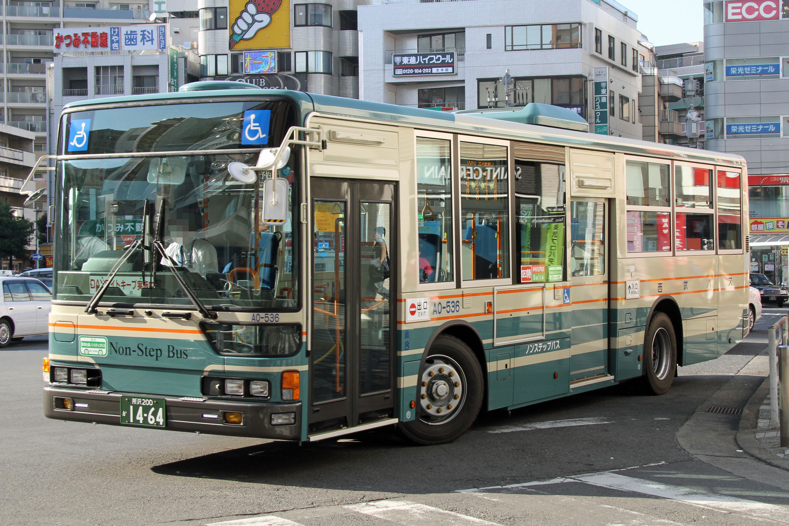 Seibu Bus Car 西武バスの車両